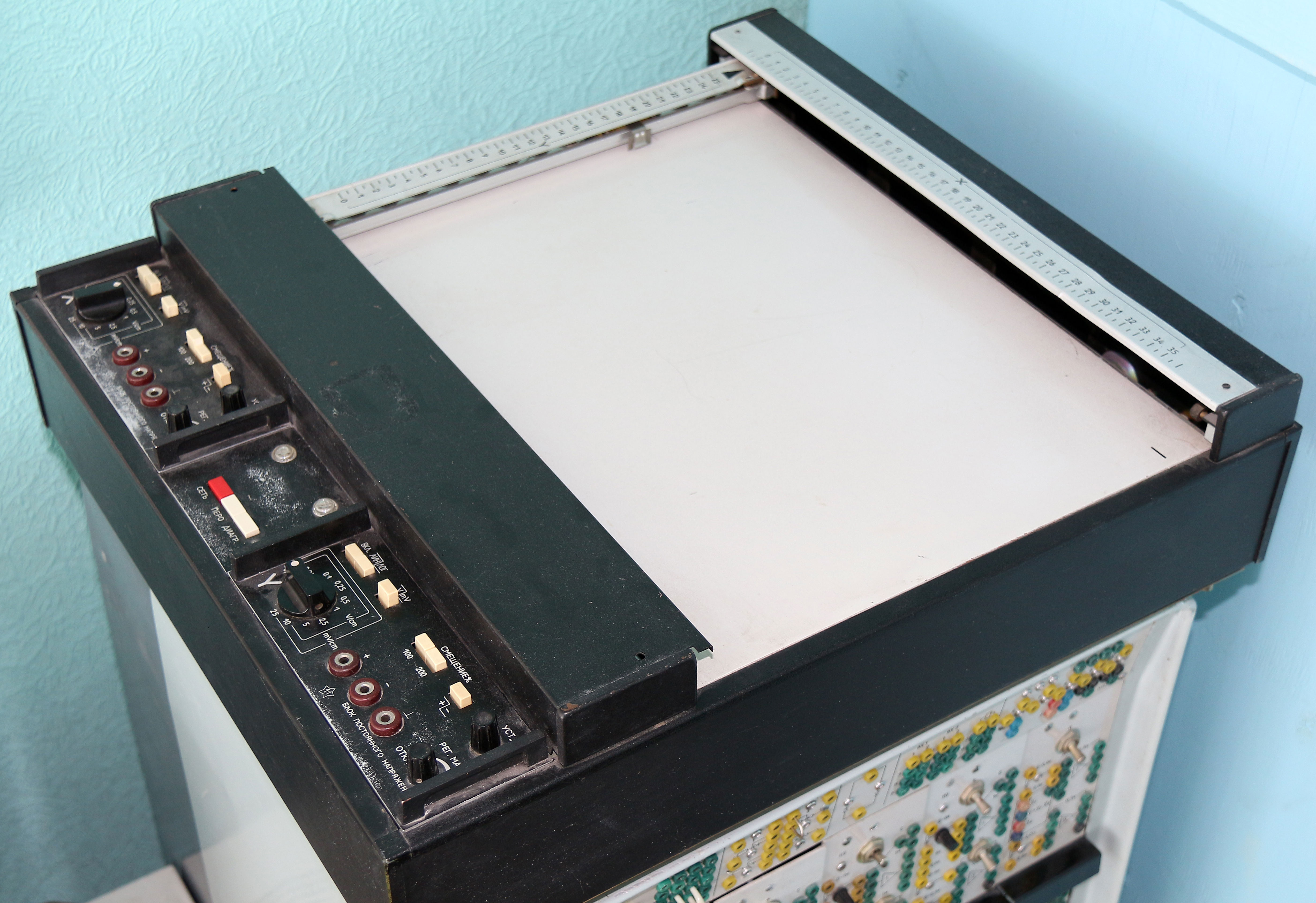 АВК-31